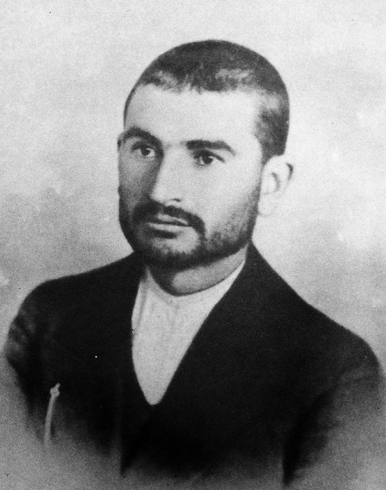 حسین لرزاده در سی سالگی